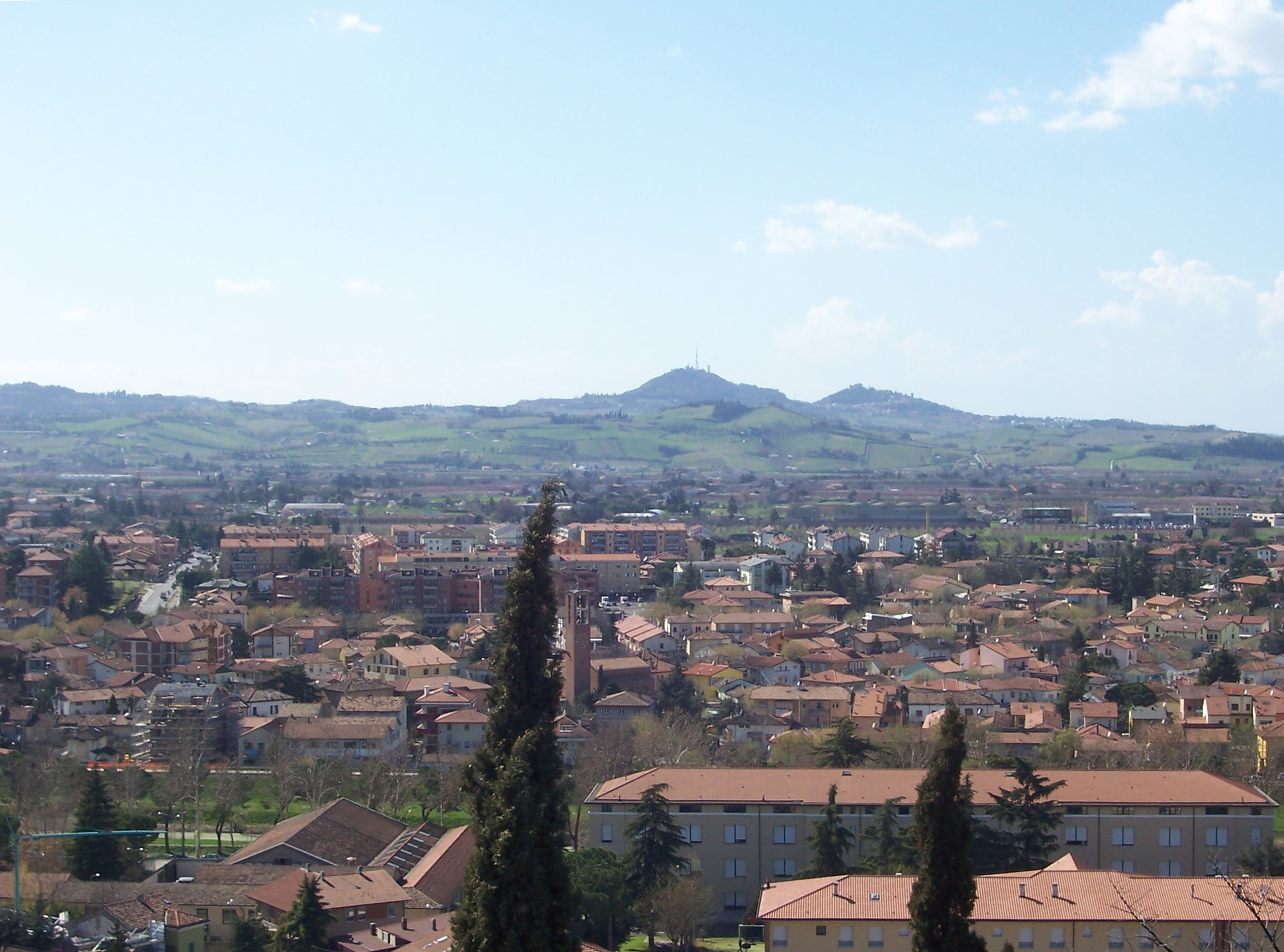 Panorma sui colli di Bertinoro dagli spalti della Rocca Malatestiana di Cesena